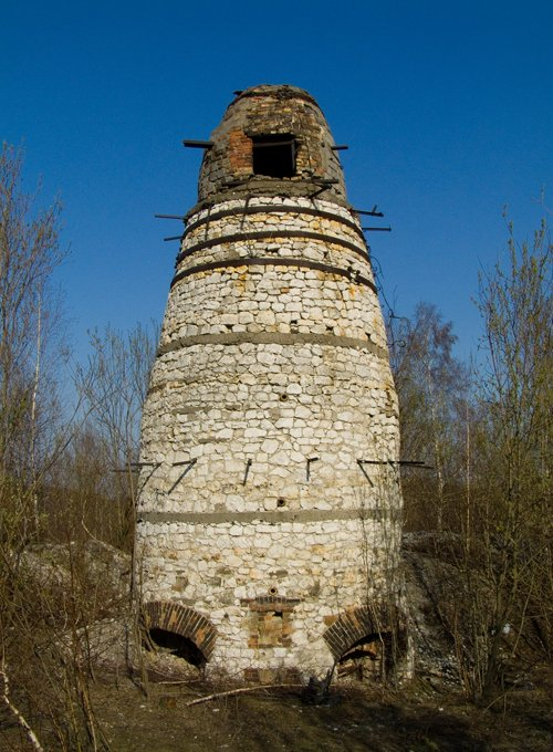 Stara wypalarnia wapienia niedaleko Tyńca